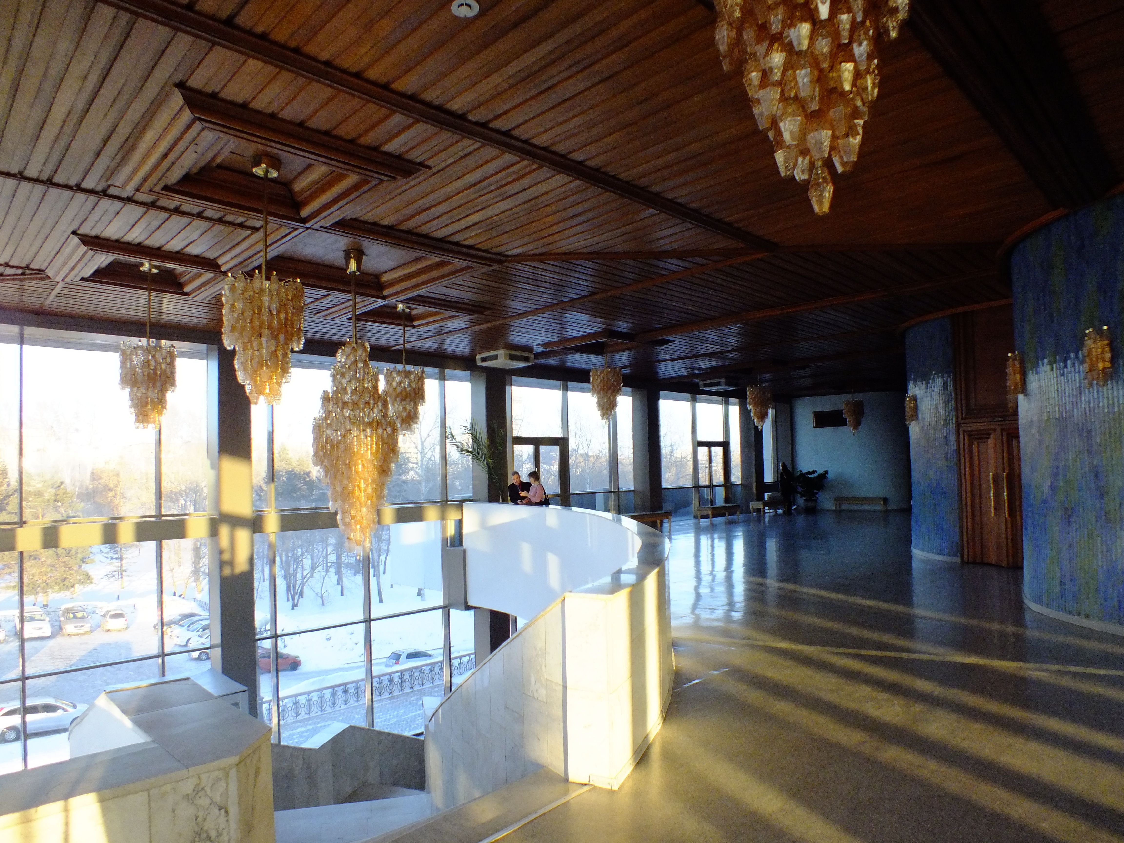 Хабаровский краевой музыкальный театр